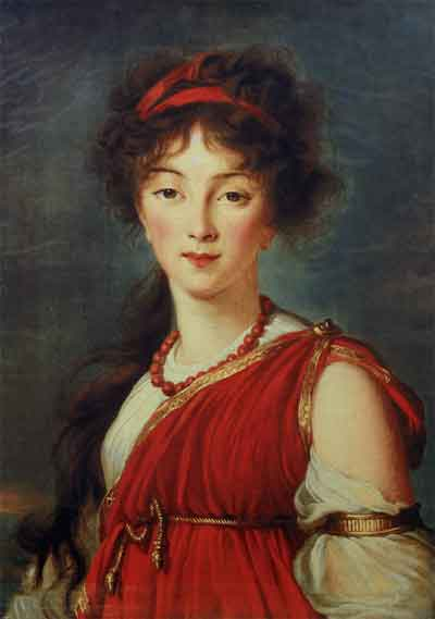 Портрет В. И. Нарышкиной (1793 -1867), с 1811 года Неклюдова.